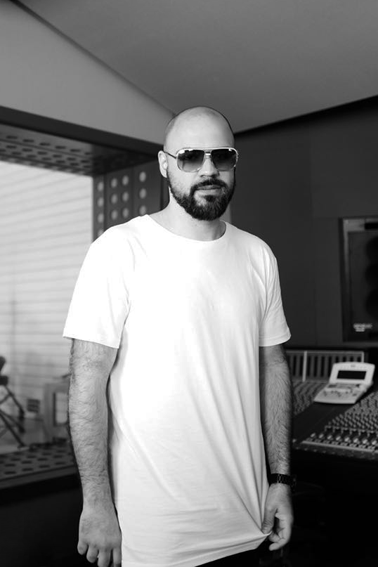 UNIK at Blackrock Studios in Santorini in 2018